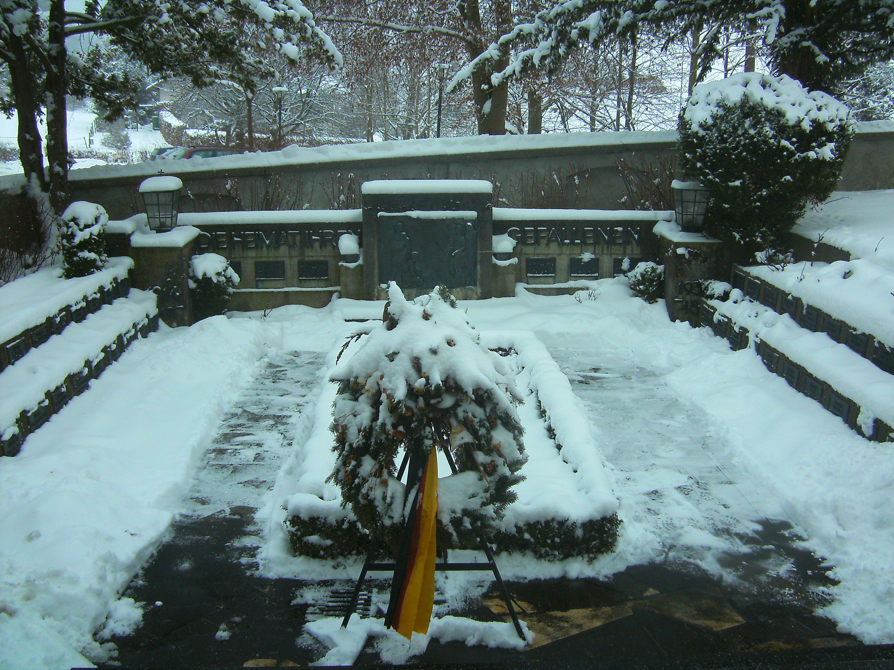 Kirche St. Martin in Kirchberg an der Iller